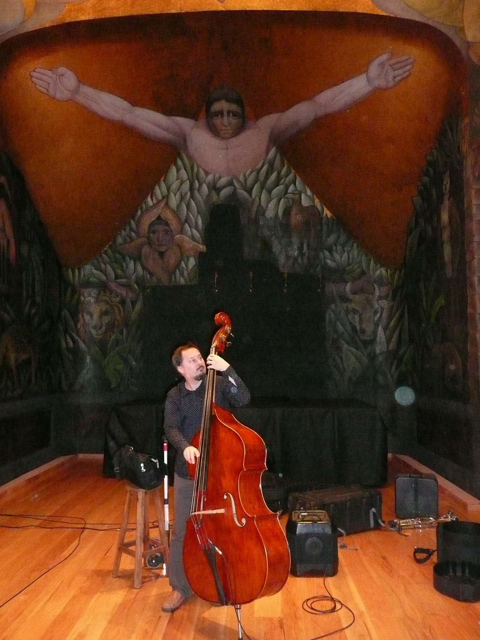 Jacek Niedziela (ur 18 stycznia 1961 w Rybniku) – polski muzyk i kompozytor jazzowy oraz wykładowca. Zdjęcie wykonane 14 marca 2010 r. w mieście Meksyk.